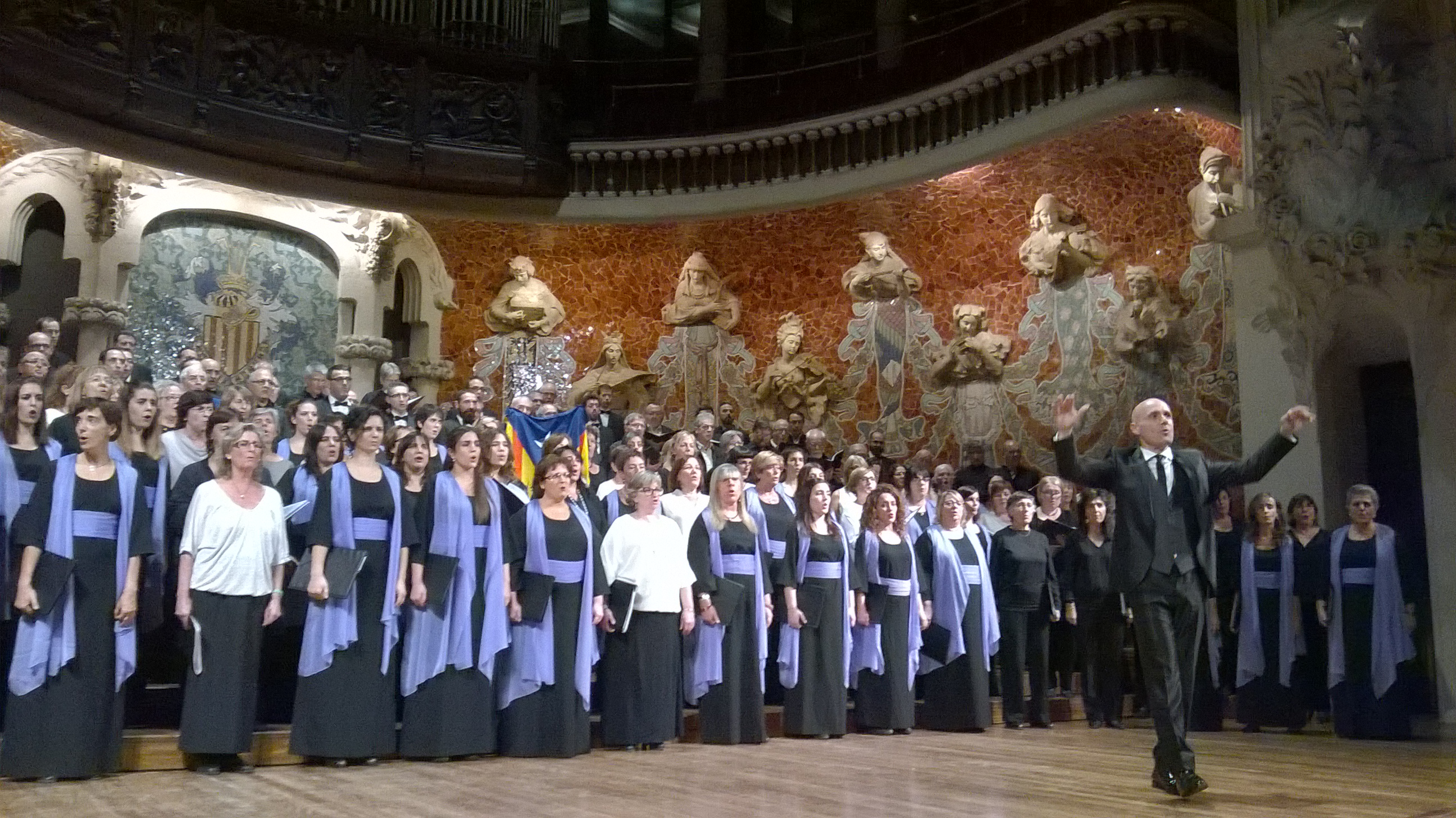 Josep Vila i Casañas dirigint l'Orfeó Català, la Capella Polifònica i el Cor l'Aixa al Palau de la Música Catalana